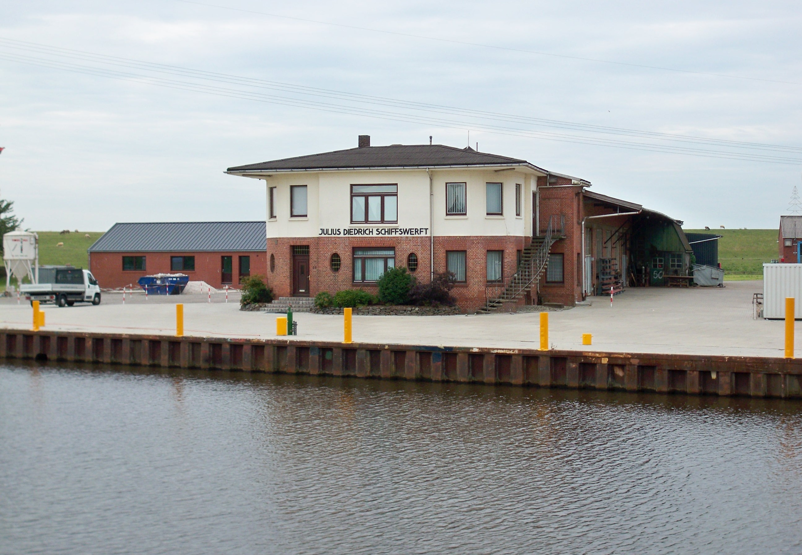 Das Hauptgebäude der Schiffswerft Diedrich, immer noch mit der bis Juni 2000 gültigen Firmenbezeichnung Julius Diedrich Schiffswerft